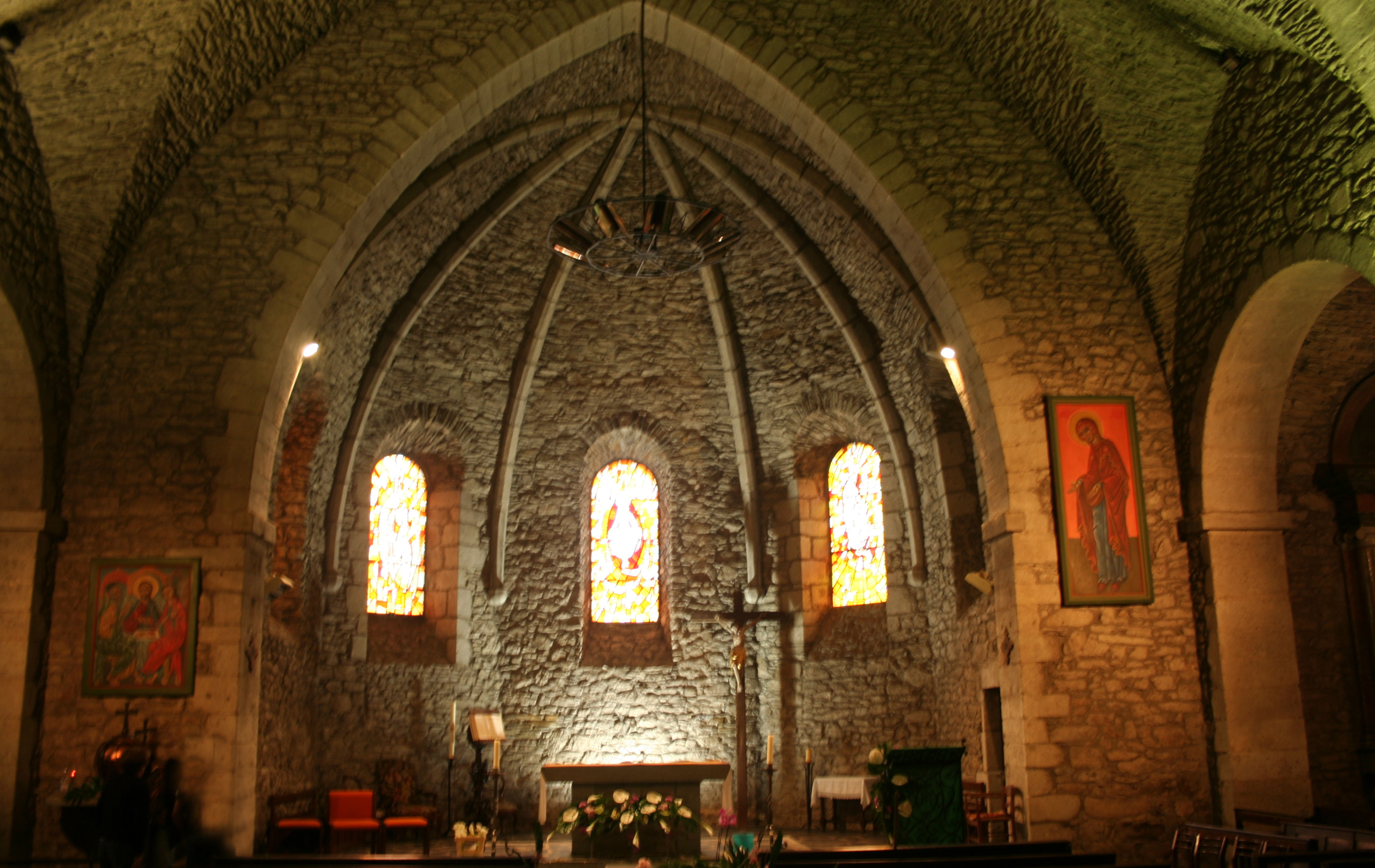 Lacaune (Tarn) - chœur de l'église Notre-Dame.